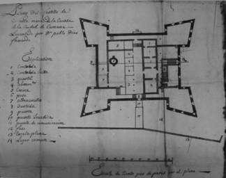 En fecha 2 de Enero de 1737 el Gobernador Interino, Marqués de San Felipe, remite un informe al Consejo de Indias donde le anexa los planos (planta y corte) firmados por del Ingeniero Extraordinario Pablo Díaz Fajardo del Castillo de Santa María de la Cabeza de Cumaná.